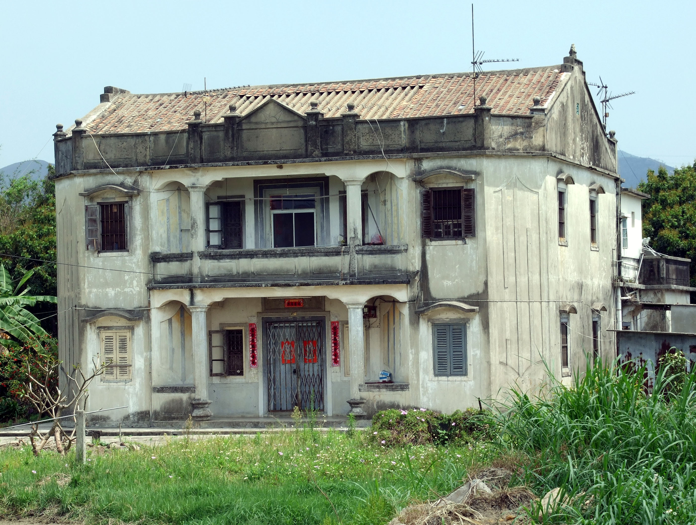 中文（香港）: 十八鄉崇正新村176號